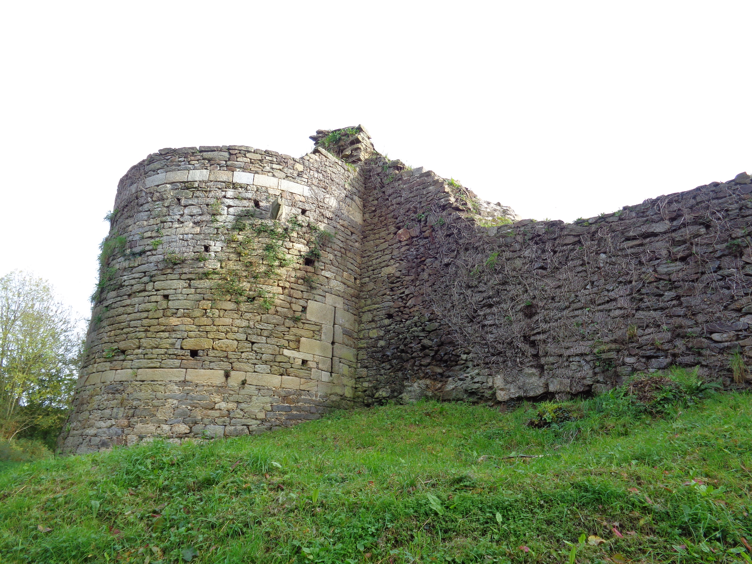 Rempart et tour nord